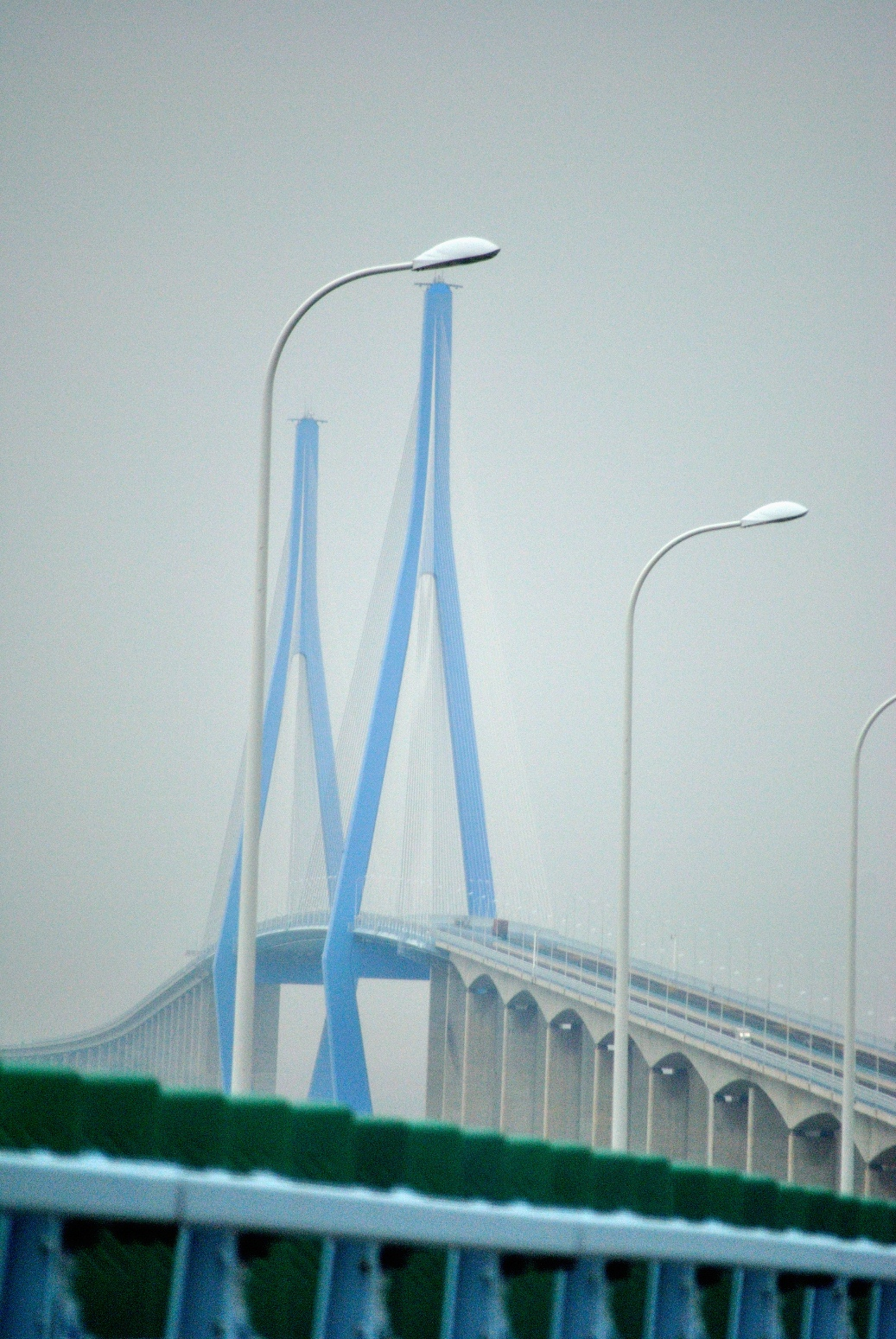 金塘大桥主跨